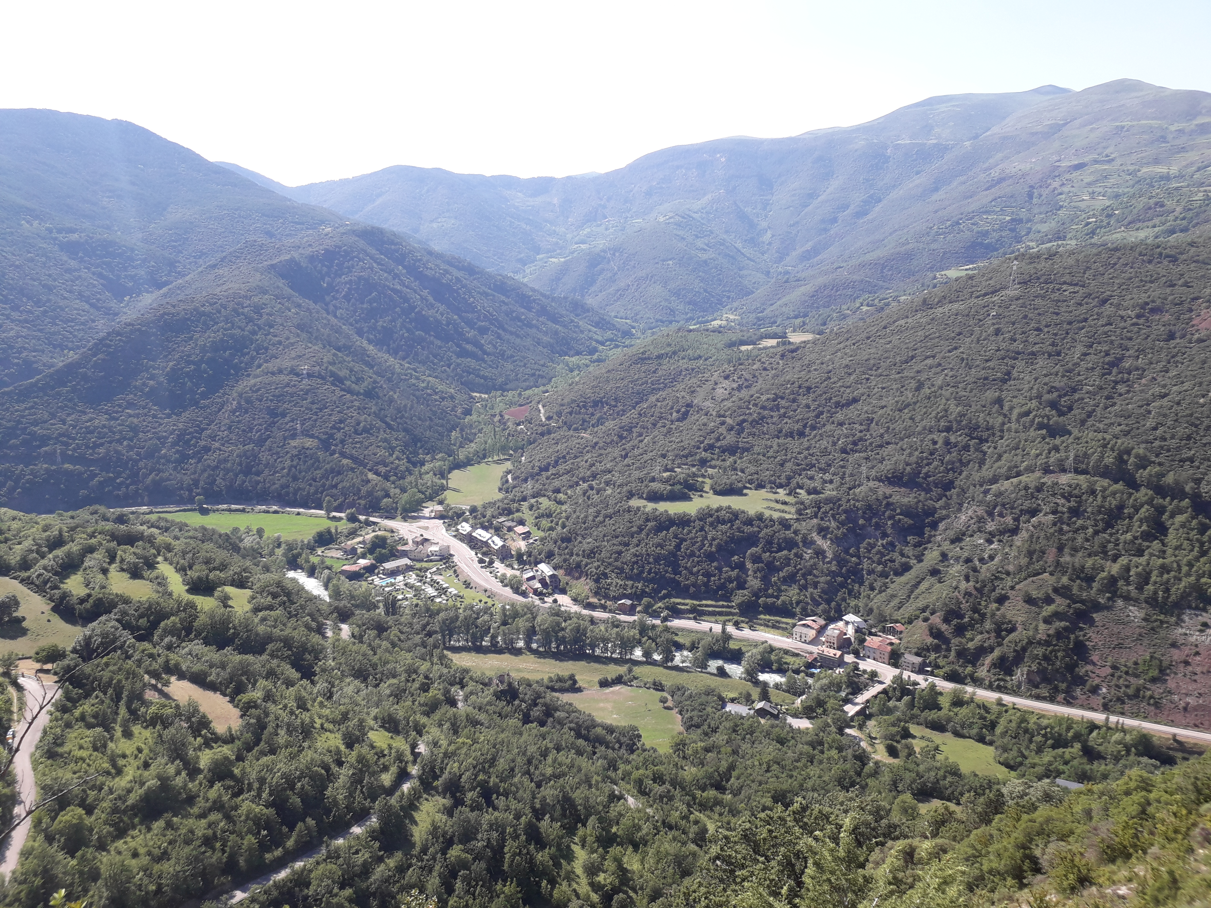 Baro de Damunt i de Davall des del camí de Tornafort